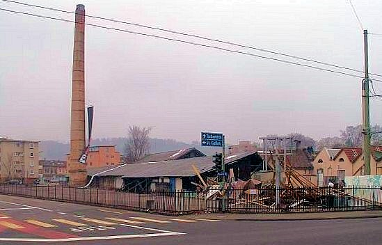 Neubesetzung. Ansicht von der Kreuzung.